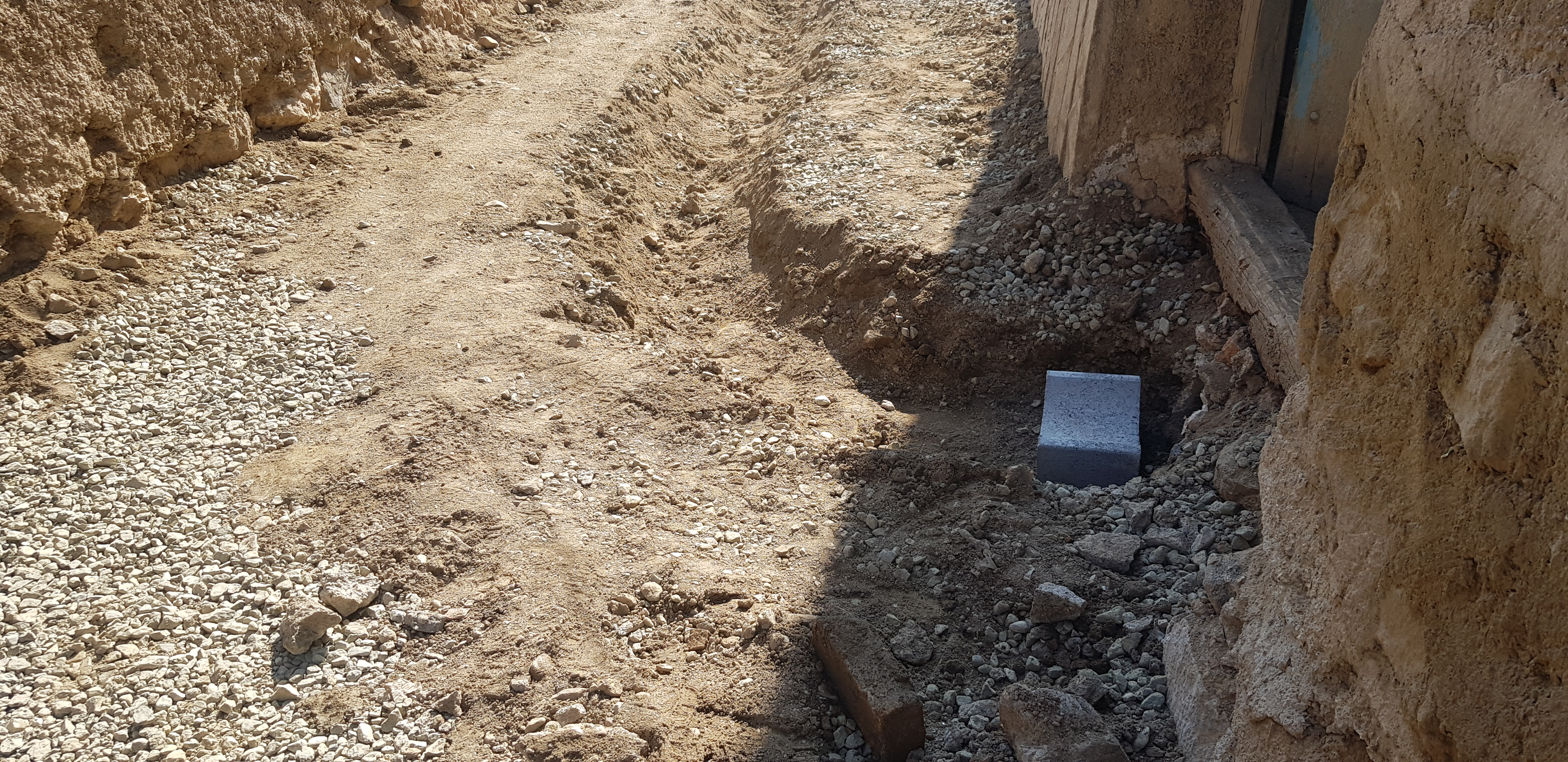 آبرو کشی کف کوچه ها